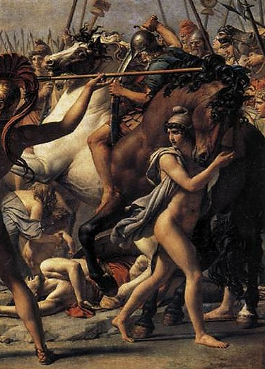 Détail de Image:Sabine women.jpg